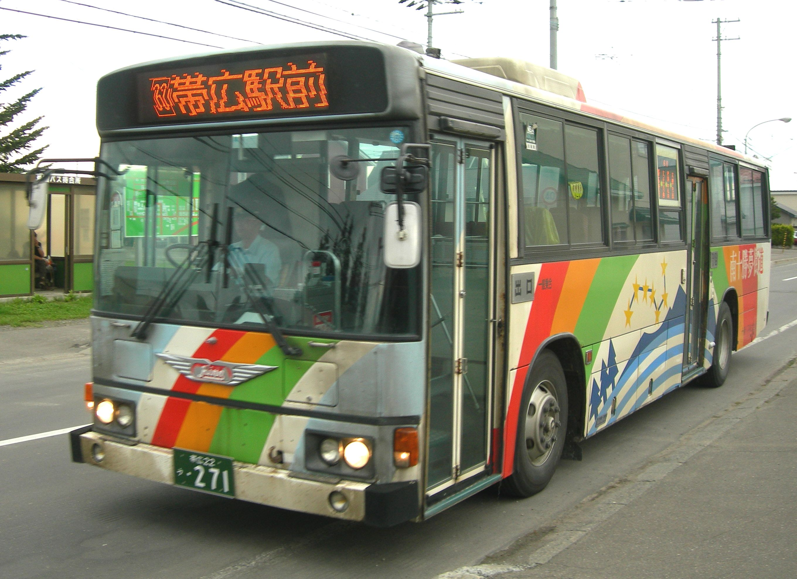 Tokachi Bus, Omnibus car 十勝バス 路線バス